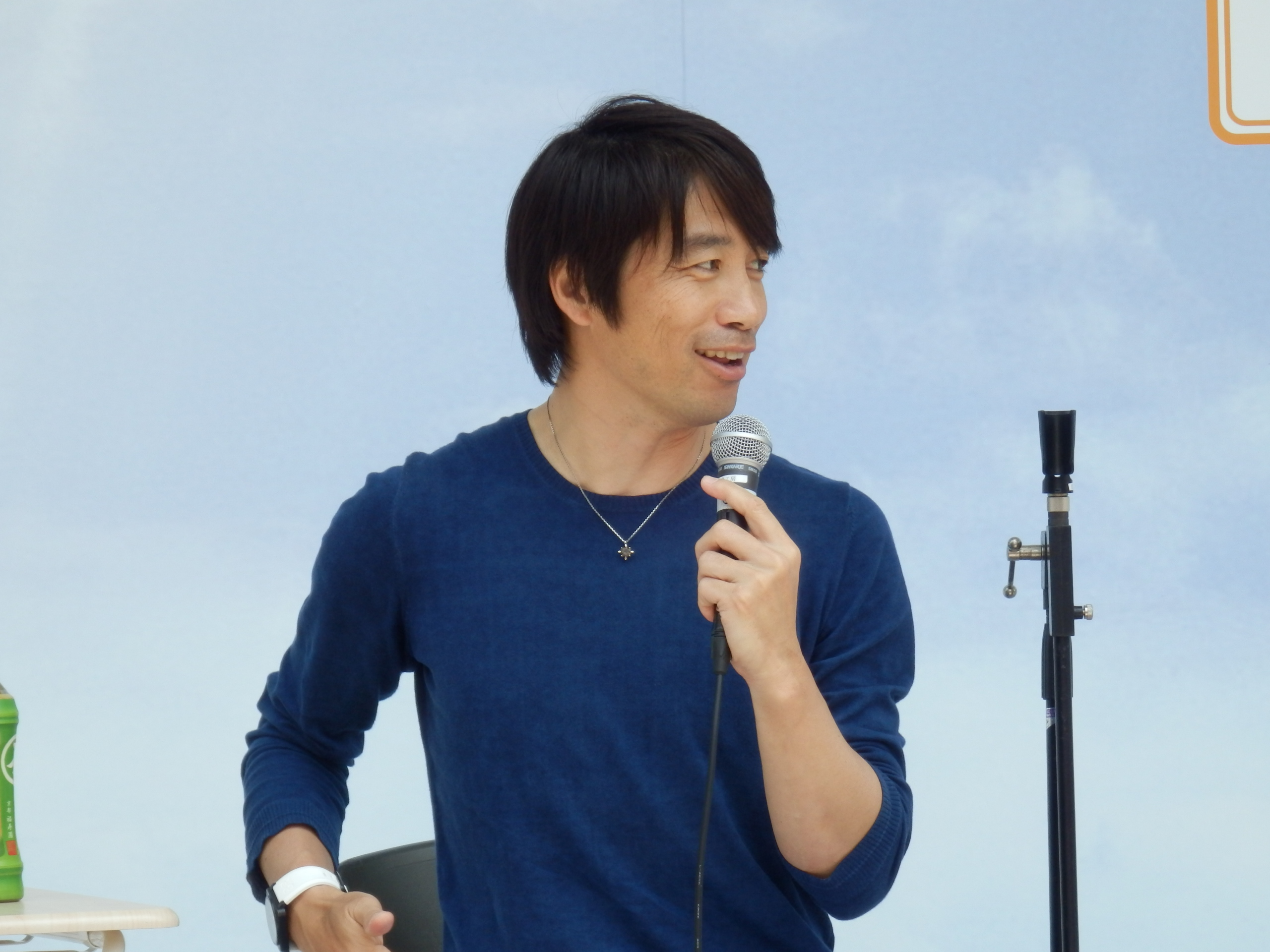 2013年5月25日 横浜市中区にて